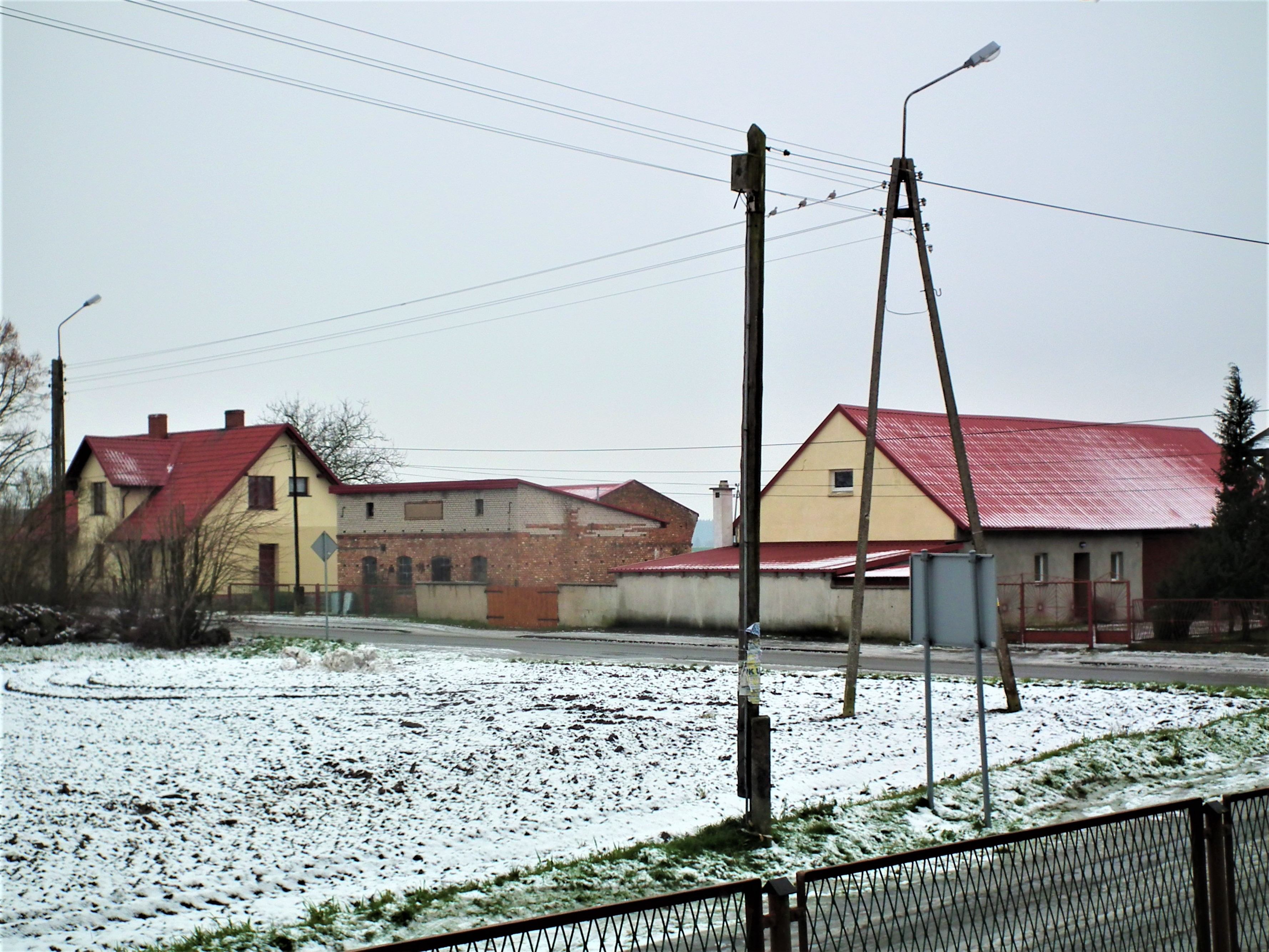 Polskie Łąki.